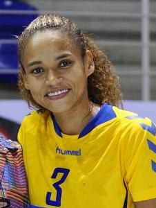 Alexandra do Nascimento, reprezentantka Brazílie v hádzanej žien, najlepšia hráčka sveta v roku 2012